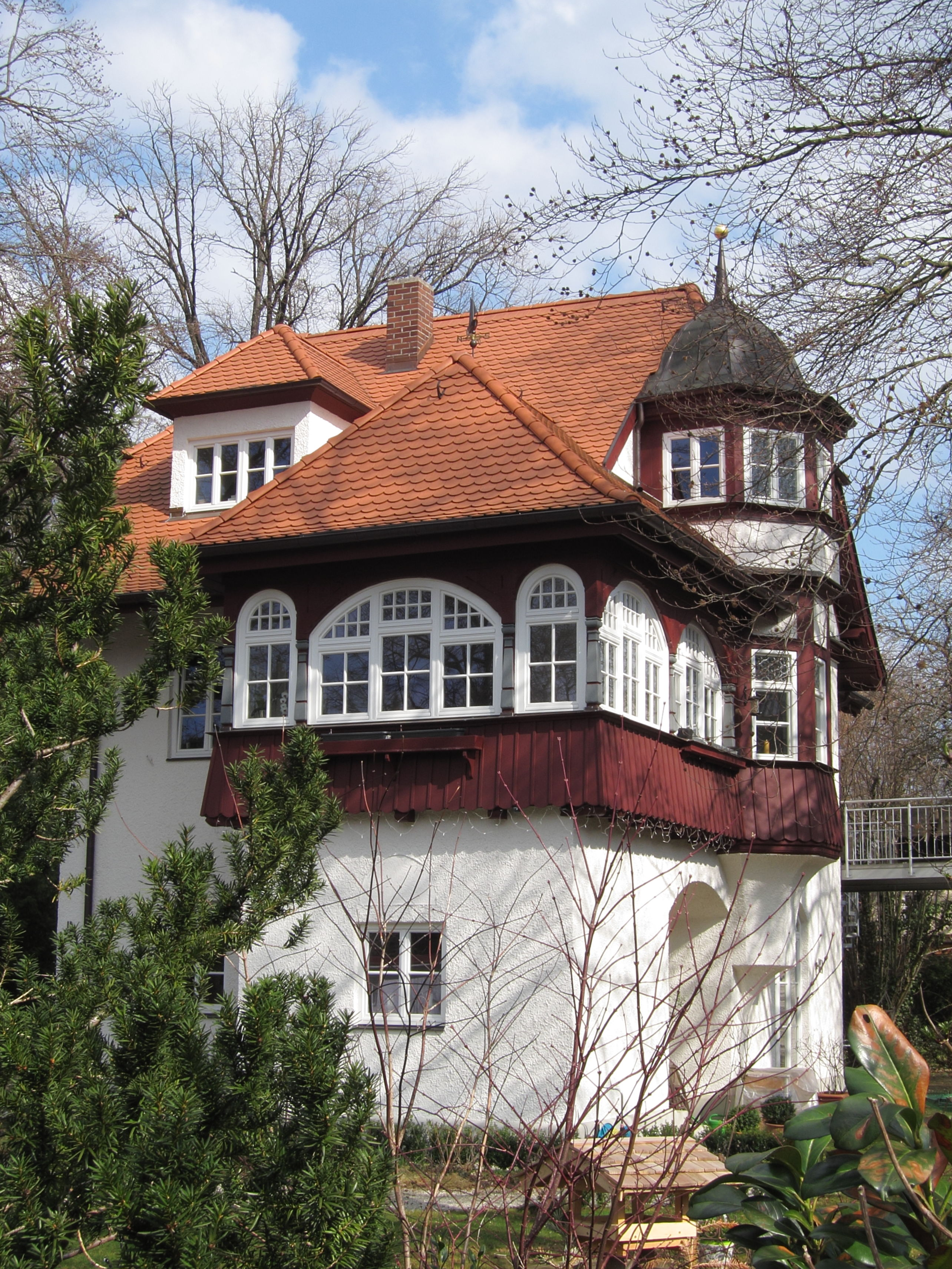 Fritz-Reuter-Straße 30; Villa, Landhausstil, um 1895, aus dem Büro August Exter.